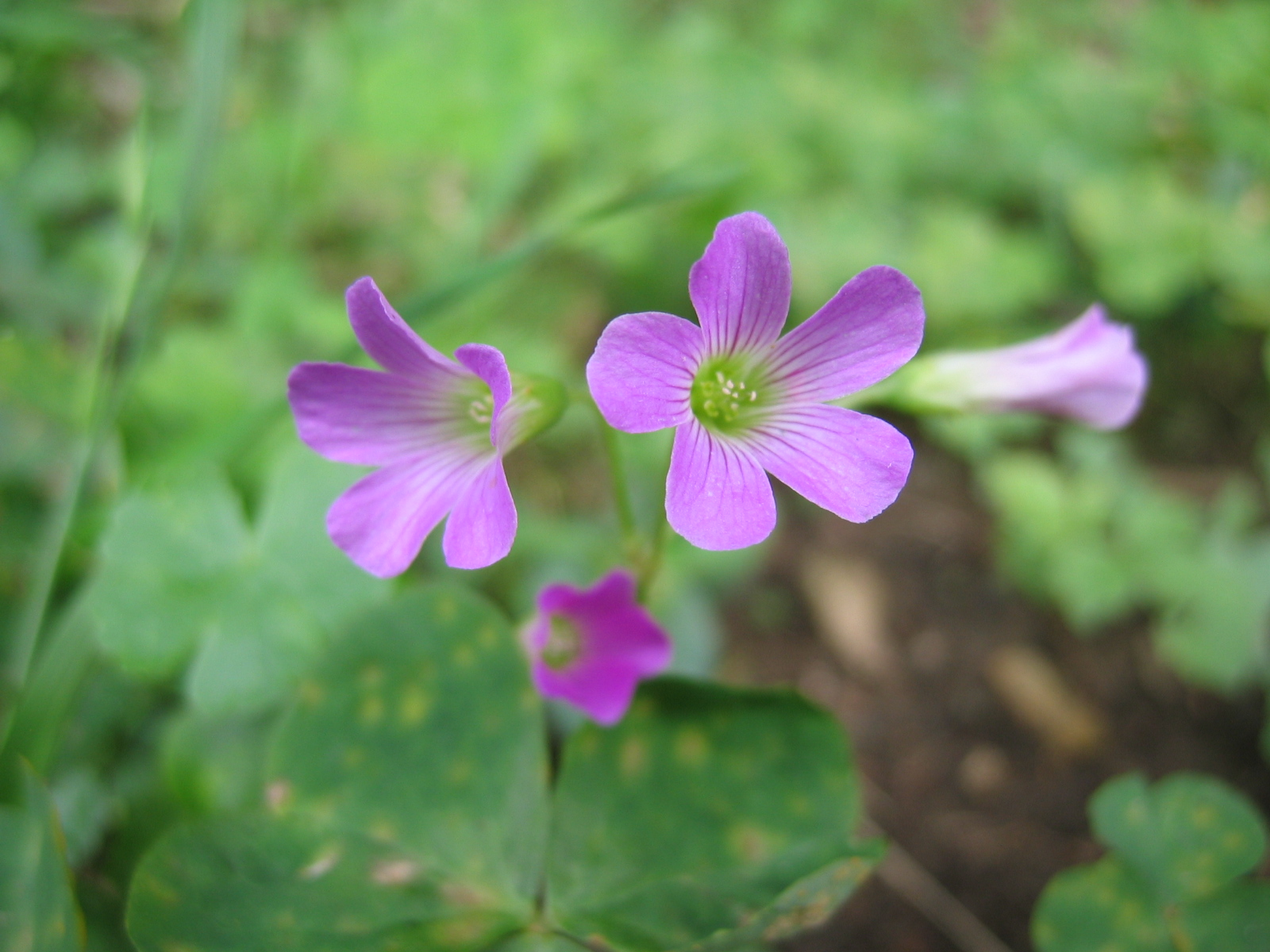 Oxalis corymbosa ムラサキカタバミ